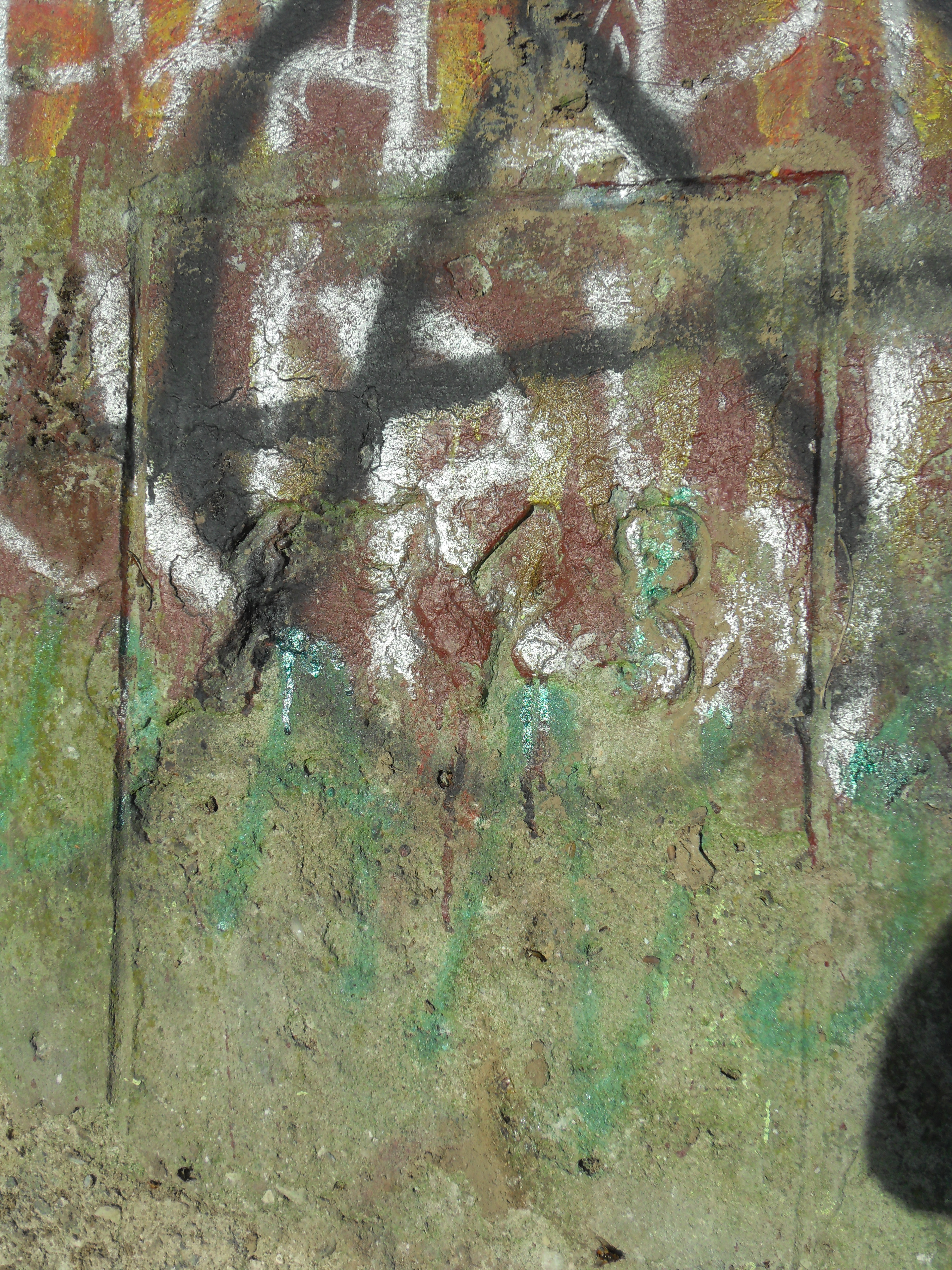 Gdańsk Strzyża, fragment nieistniejącego wiaduktu nad dawną linią kolejową Gdańsk Wrzeszcz-Stara Piła. Rok 1913.